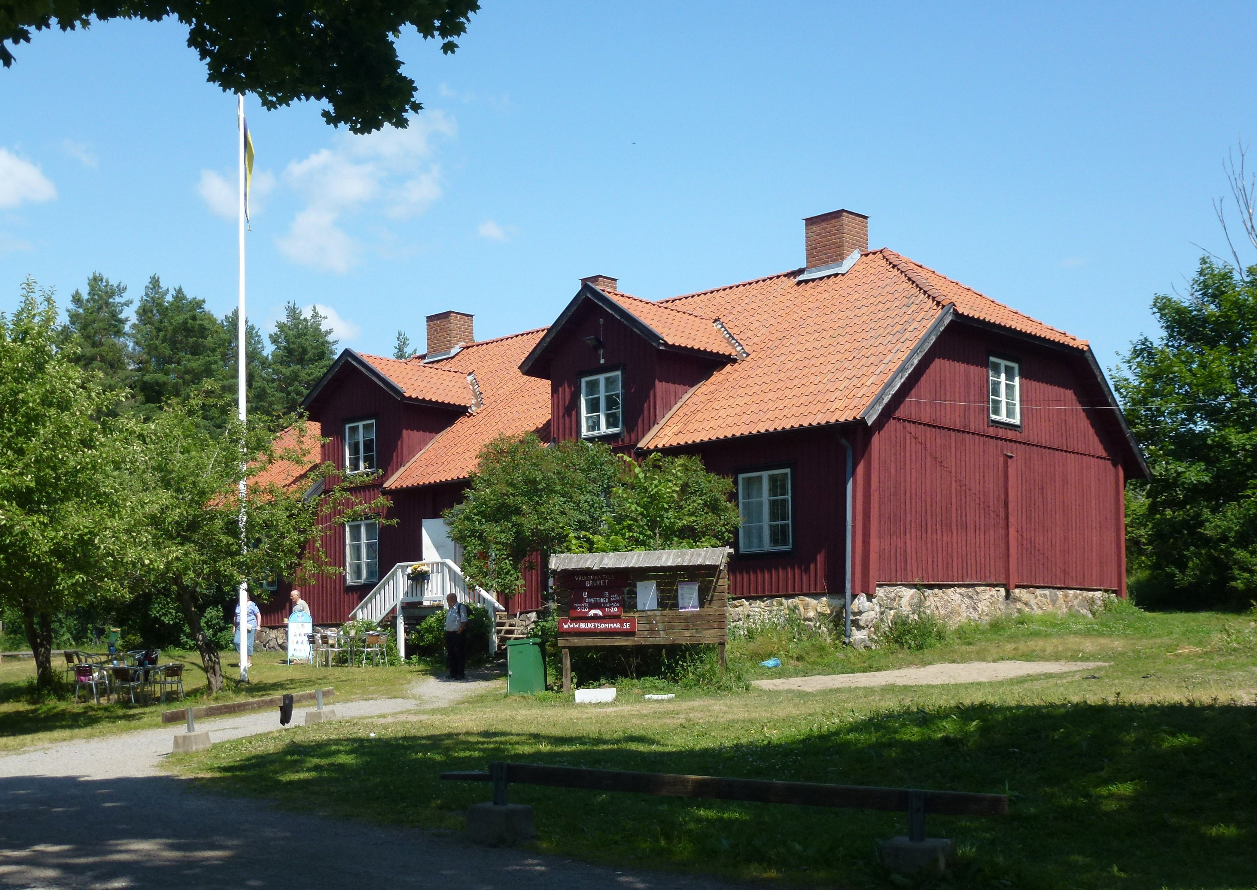 Görvälns tegelbruk, arbetarebostad "Bruket"